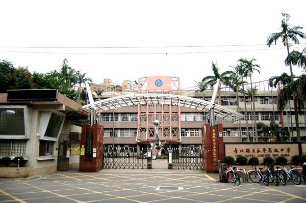 中文（台灣）: 臺北縣永和市永平高級中學。